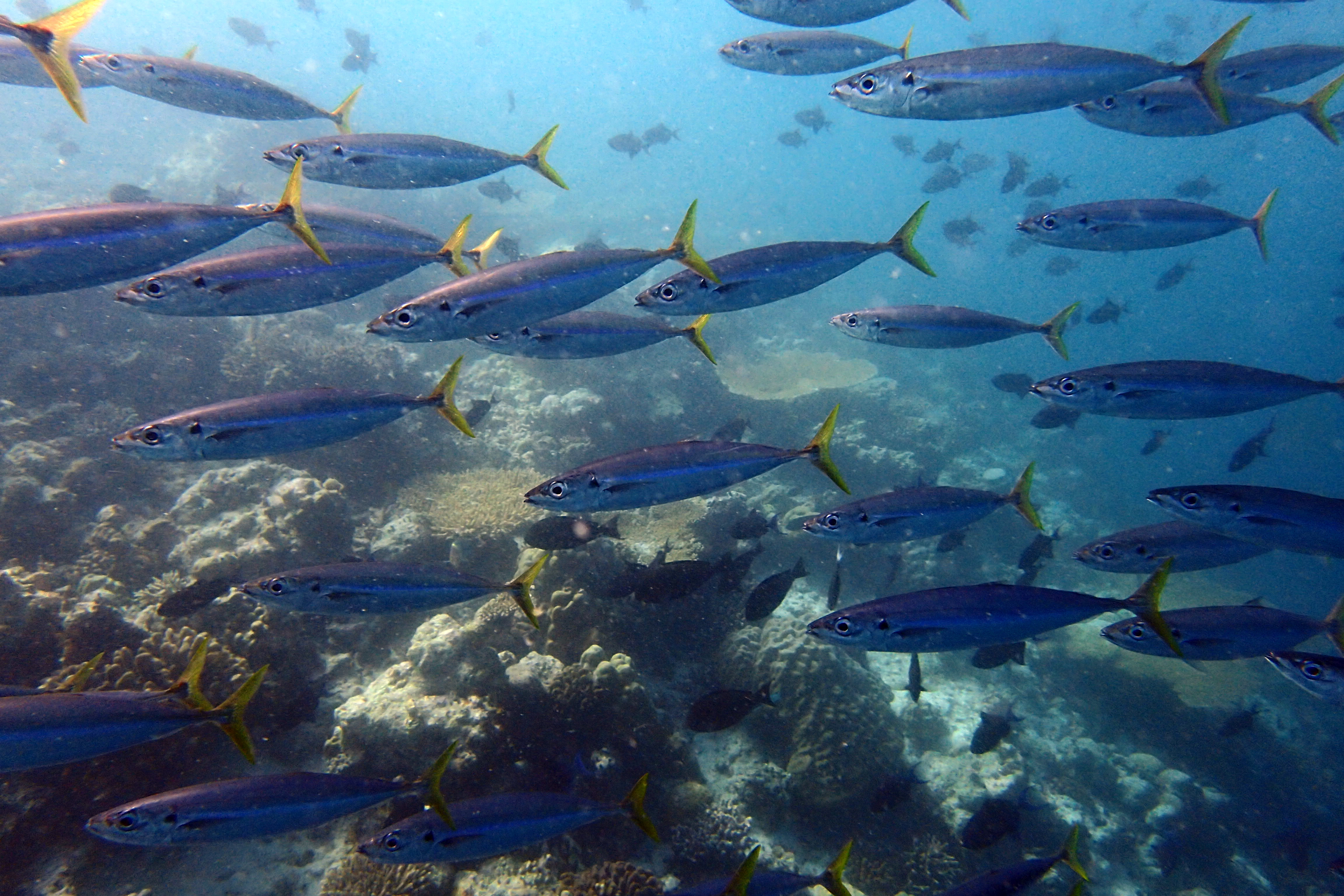 Un banc de maquereaux comète (Decapterus macarellus) aux Maldives (atoll de Baa).